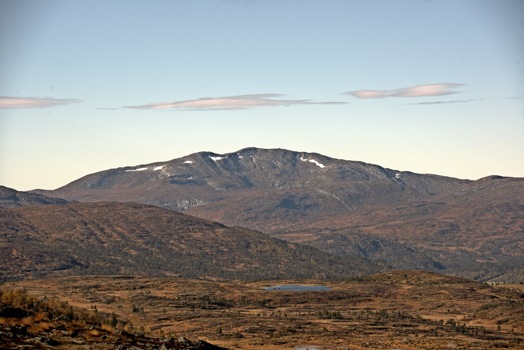 Ruten i Hemne sett fra Vardefjellet